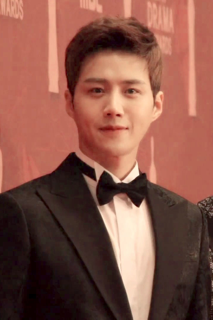 2017 MBC 연기대상 - 투깝스 이시언, 김선호